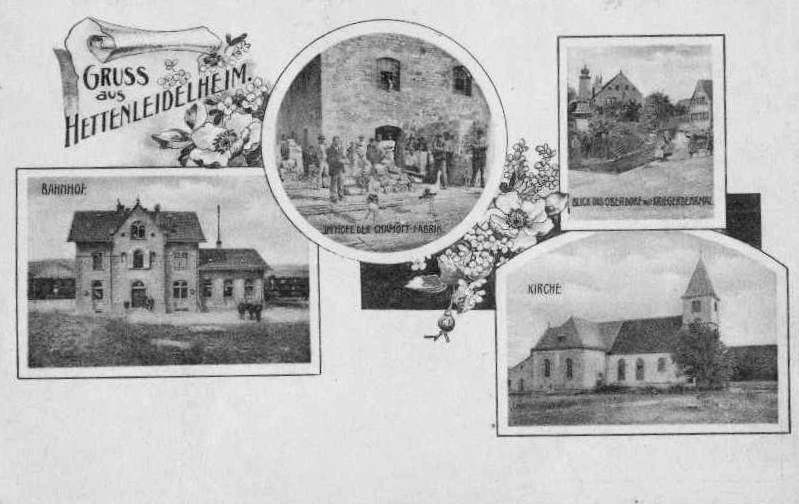 Hettneleidelheim auf einer Postkarte von 1904